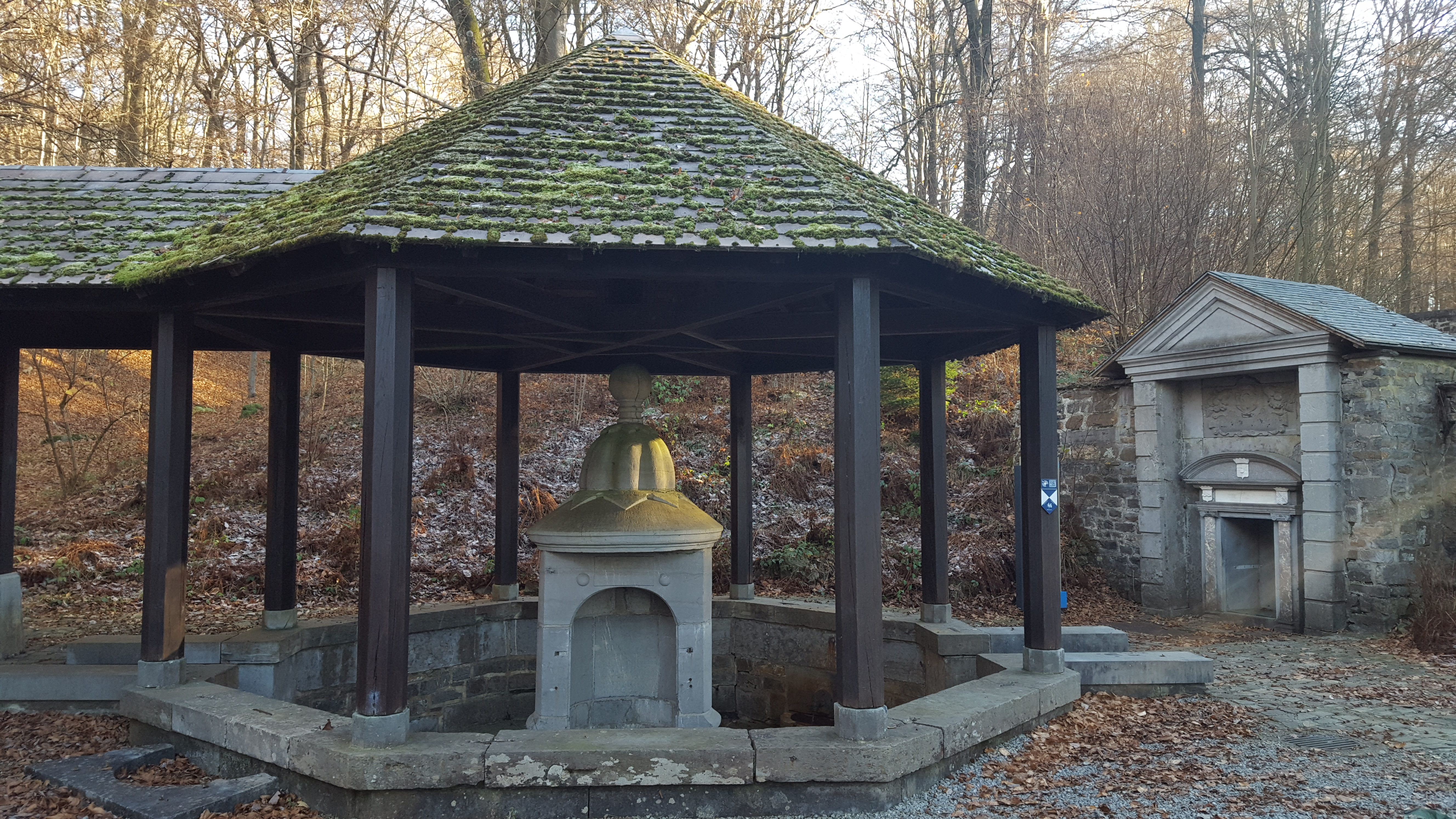 Source de la Sauvenière et Source de Groesbeek, Spa, Belgique